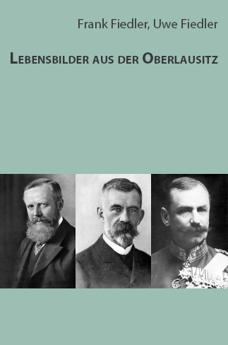 Lebensbilder aus der Oberlausitz: 48 Biografien aus Bautzen, Bischofswerda und Umgebung, Books on Demand, ISBN 3842351771, Hardcover, 5. Auflage, 308 Seiten.Klappentext: Die Oberlausitz ist eine ländlich geprägte Region im Osten Deutschlands. Zwischen Bischofswerda und Görlitz finden sich naturnahe Landschaften, aber auch vielfältige Zeugnisse einer reichen kulturellen Tradition. Bautzen blickt auf eine mehr als 1000-jährige Geschichte zurück. In der Oberlausitz wurden bedeutende Wissenschaftler und Künstler geboren, die sich weit über die Grenzen ihrer Heimat einen Namen machten, und verdienstvolle Persönlichkeiten aus nah und fern haben hier ihre Spuren hinterlassen. Das vorliegende Buch stellt die Biografien von 58 Wissenschaftlern, Künstlern, Theologen und Politikern vor. Themen u. a.: Francois Basile Azémar - Arthur Biram - Karl August Böttiger - Gerhard Creutz - Georg Derlitzki - Ernst Giese - Josef Goller - Wiprecht von Groitzsch - Eduard Heiden - Walther Hempel - Walther Hesse - Christian Adolph Klotz - Adolf Lier - Gustav Loges - Karl Wilhelm Mittag - Francesco Morlacchi - Max Neumeister - Gottlob Adolf Ernst von Nostitz und Jänkendorf - Eduard von Nostitz und Jänckendorf - Johannes Pache - Georg Petermann - Ernst Rietschel - Osmar Schindler - Karl Gottfried Siebelis - Bruno Steglich - Hermann Steudner - Ernst Theordor Stöckhardt - Julius Reinhold Stöckhardt - Clara Henriette Marie Stöckhardt - Gottlob Friedrich Thormeyer - Gottfried Unterdörfer - Johann Eleazar Zeissig